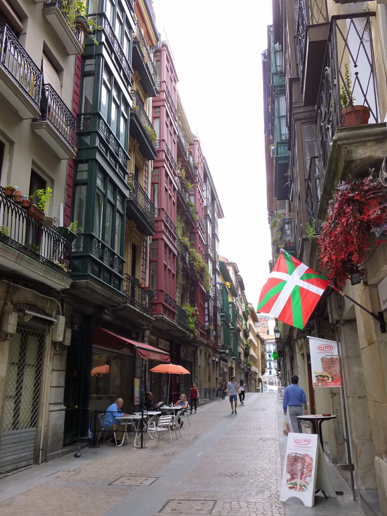 Calle Arategizar, en el Casco Viejo de Bilbao